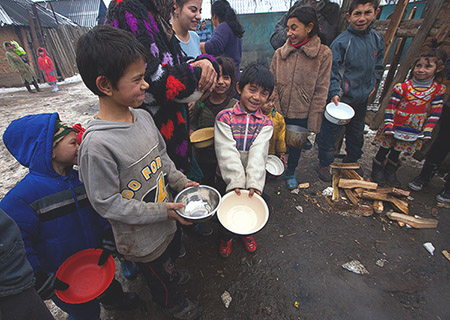 Благодійний обід в ромському таборі (Мукачево)